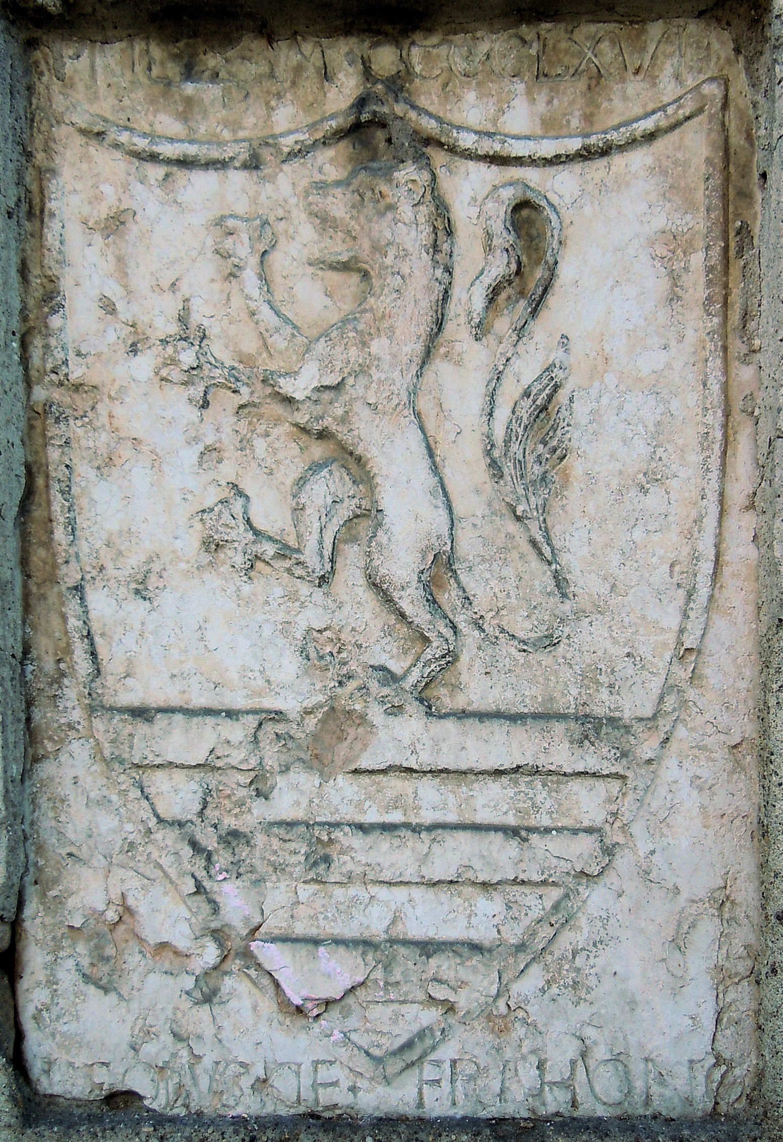 Mariana Mantovana, stemma dei Faroni sulla porta del castello.